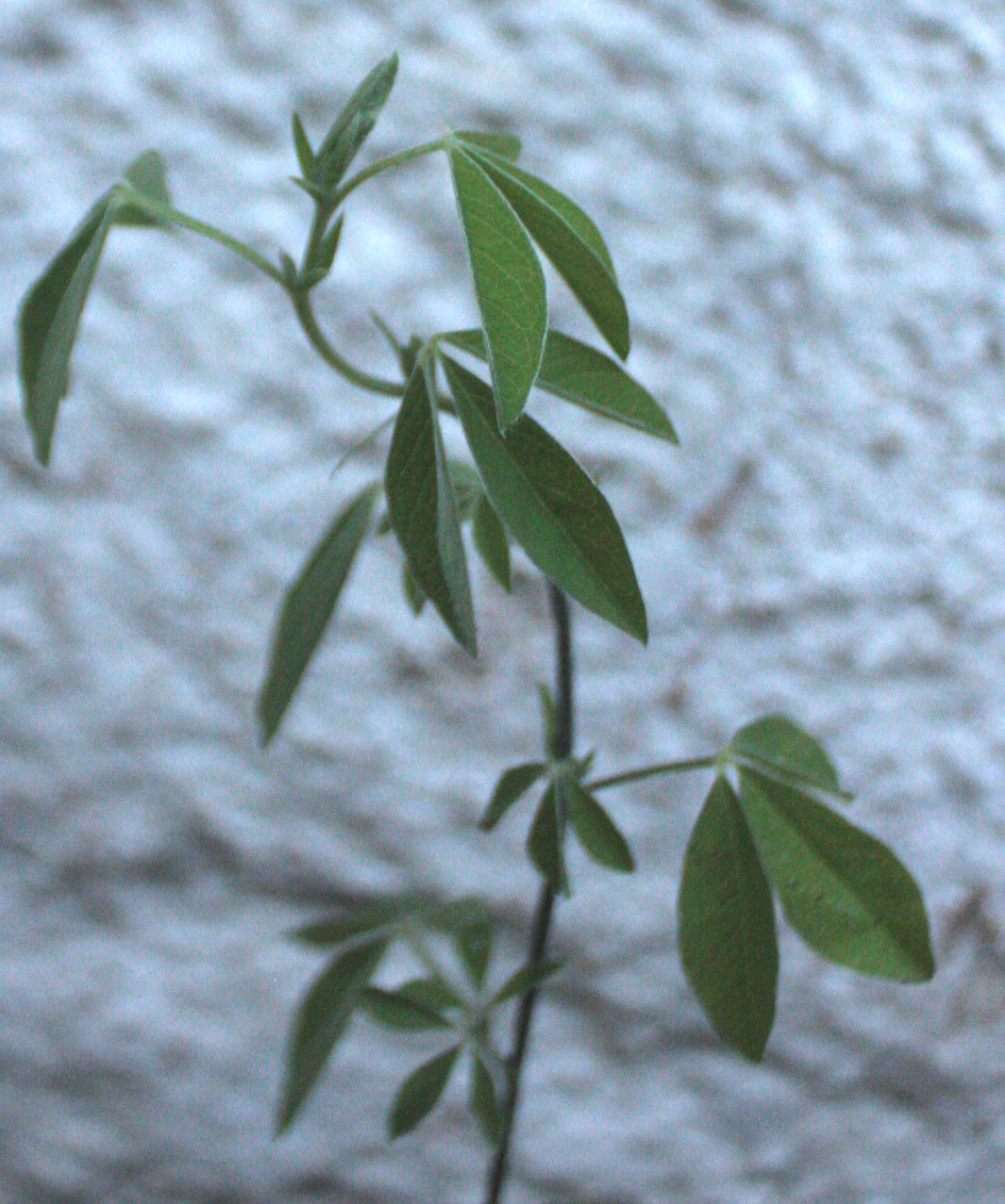 Thermopsis chinensis vlčinec čínský